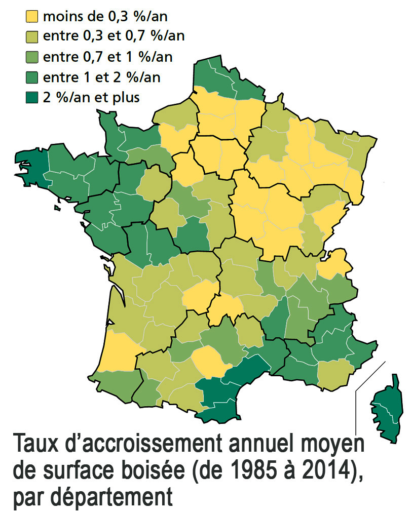 Forêt française : accroissement par dept 2014 publié en 2017(estimation) d'après données et graphiques 2014 collectées par l'IGN et publiés en 2017 (IGN (2017) Le mémento ; Inventaire forestier 2017)